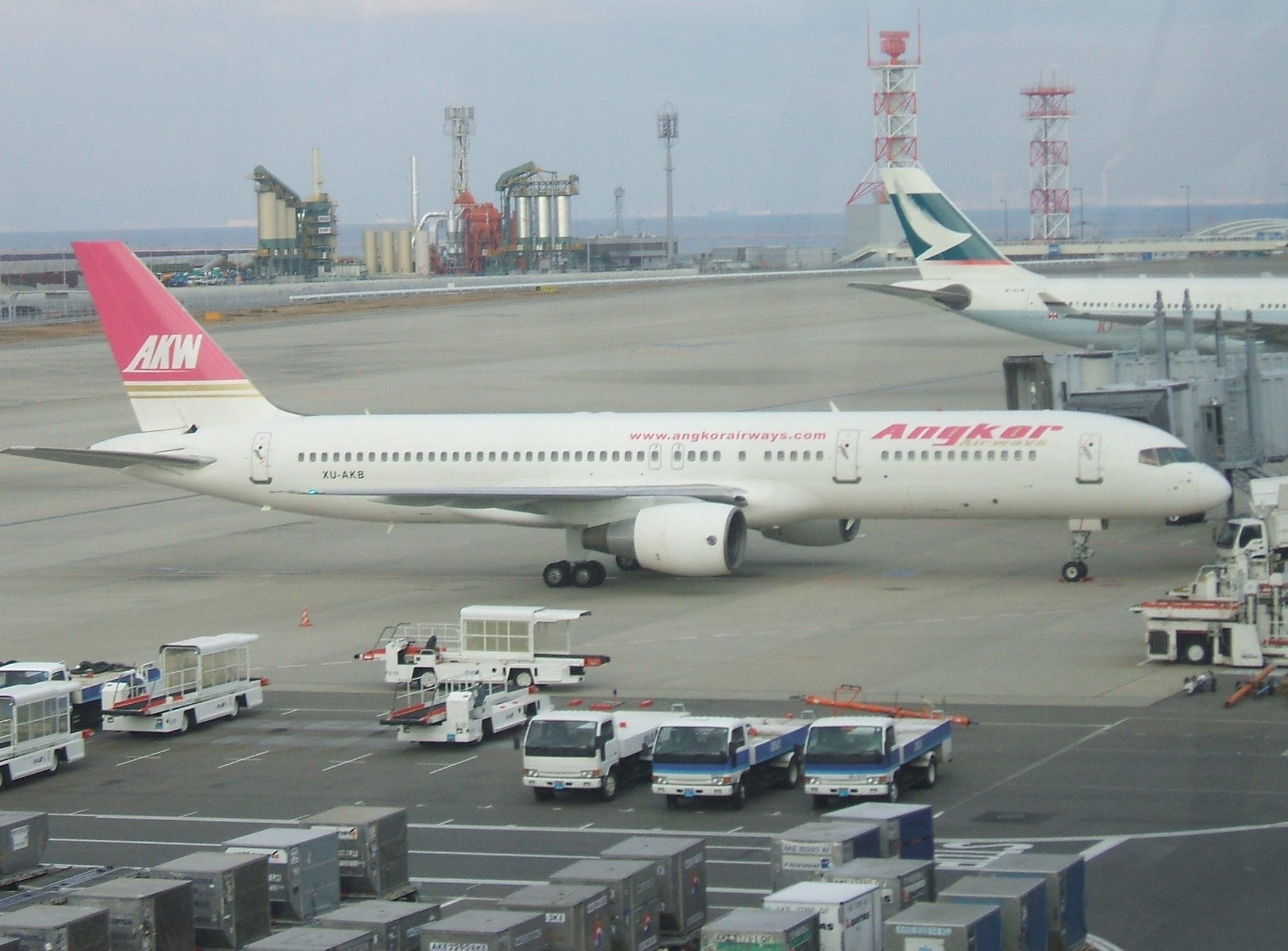 Angkor Airways Boing 757 XU-AKB in Kansai International airport